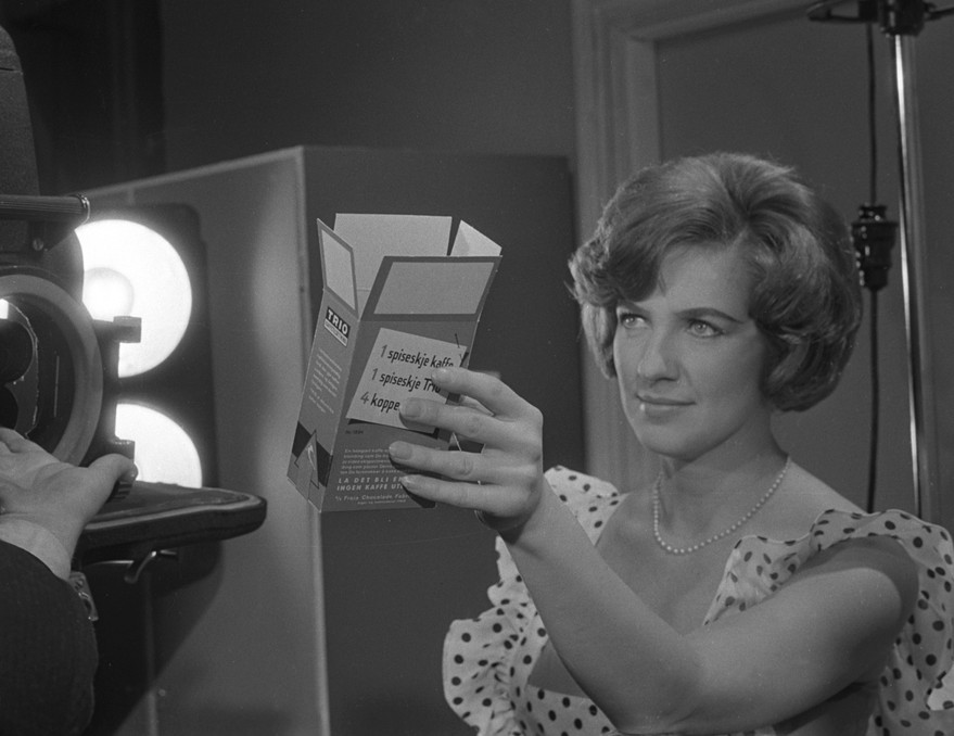 Foto av sangeren og artisten Sølvi Wang (1929-2011) i forbindelse med en innspilling av TV-programmet "Slagerparaden" i NRK 2. desember 1960